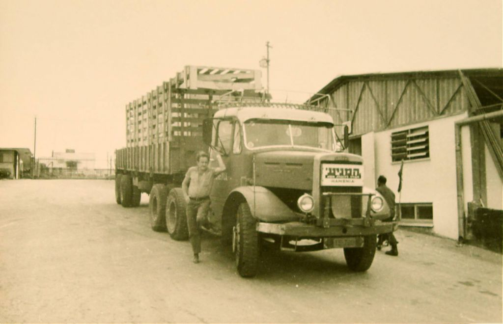 ליילנד ביבר מודל 1958 הנהג יהודה מוגילוב